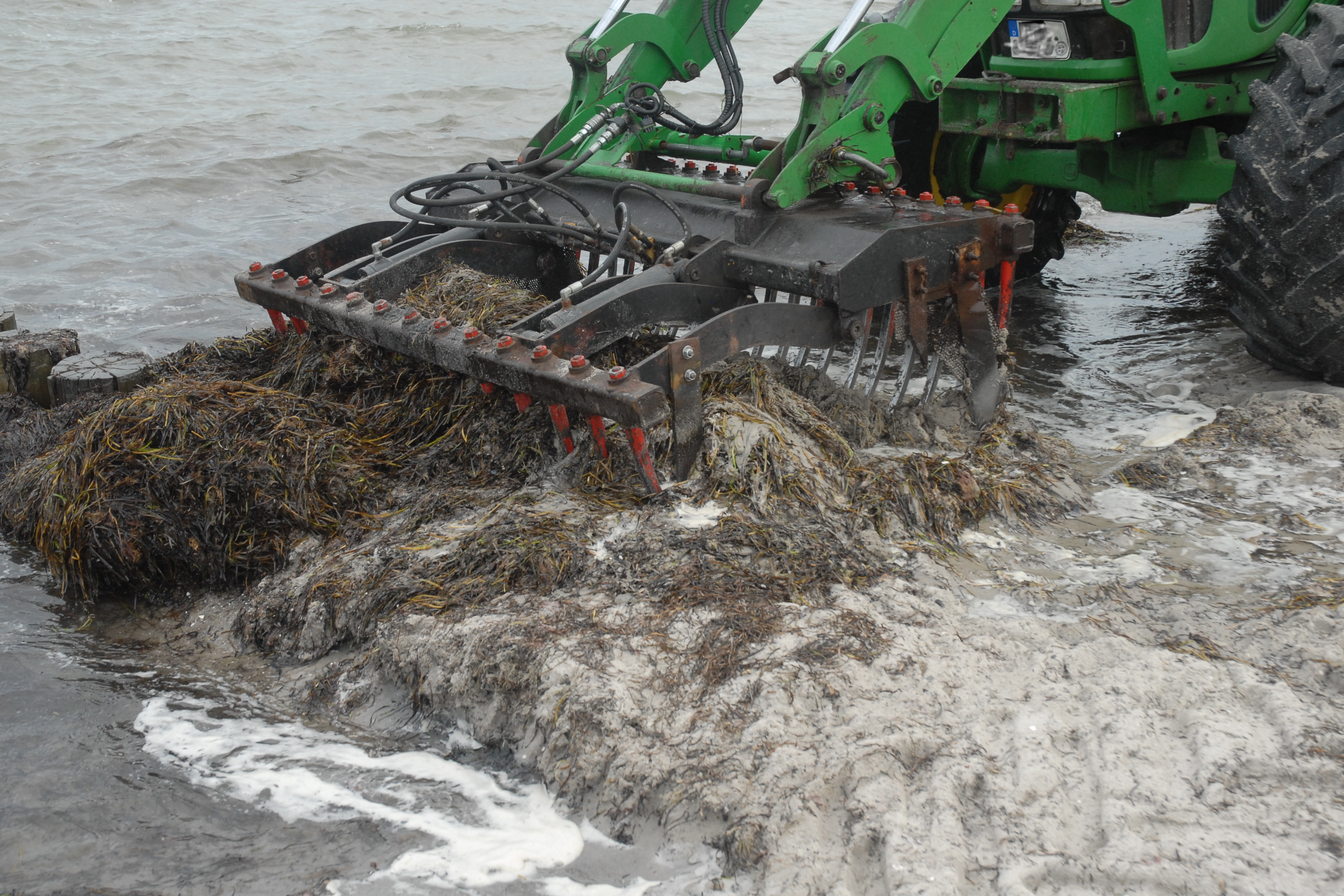 Auf der Insel Poel wird mit einem Trecker Strandanwurf zusammengeschoben und aufgenommen.